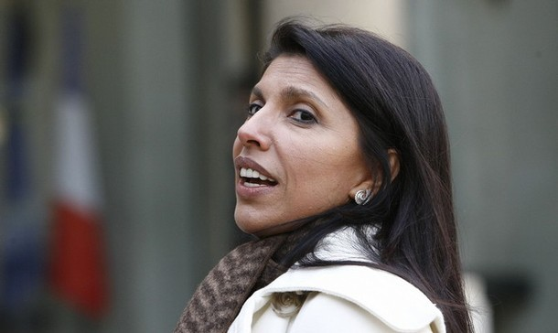 Portrait de Nassimah Dindar en mai 2008.